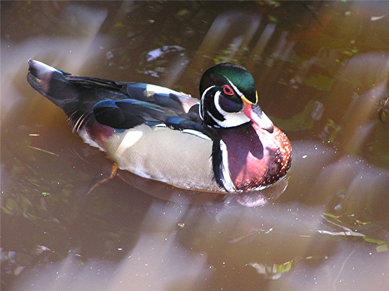 Woodduck.